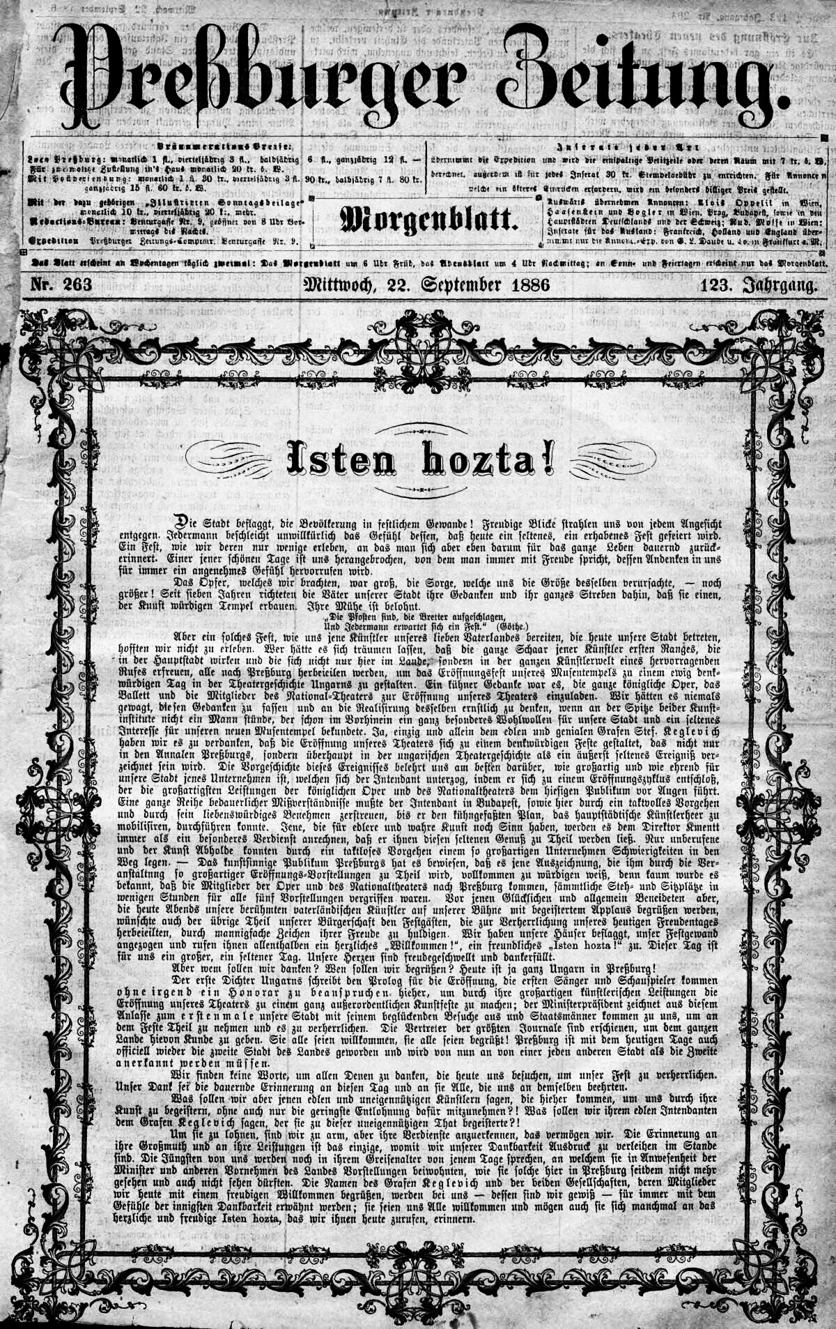 Eröffnung des neuen Theaters am 22. September 1886